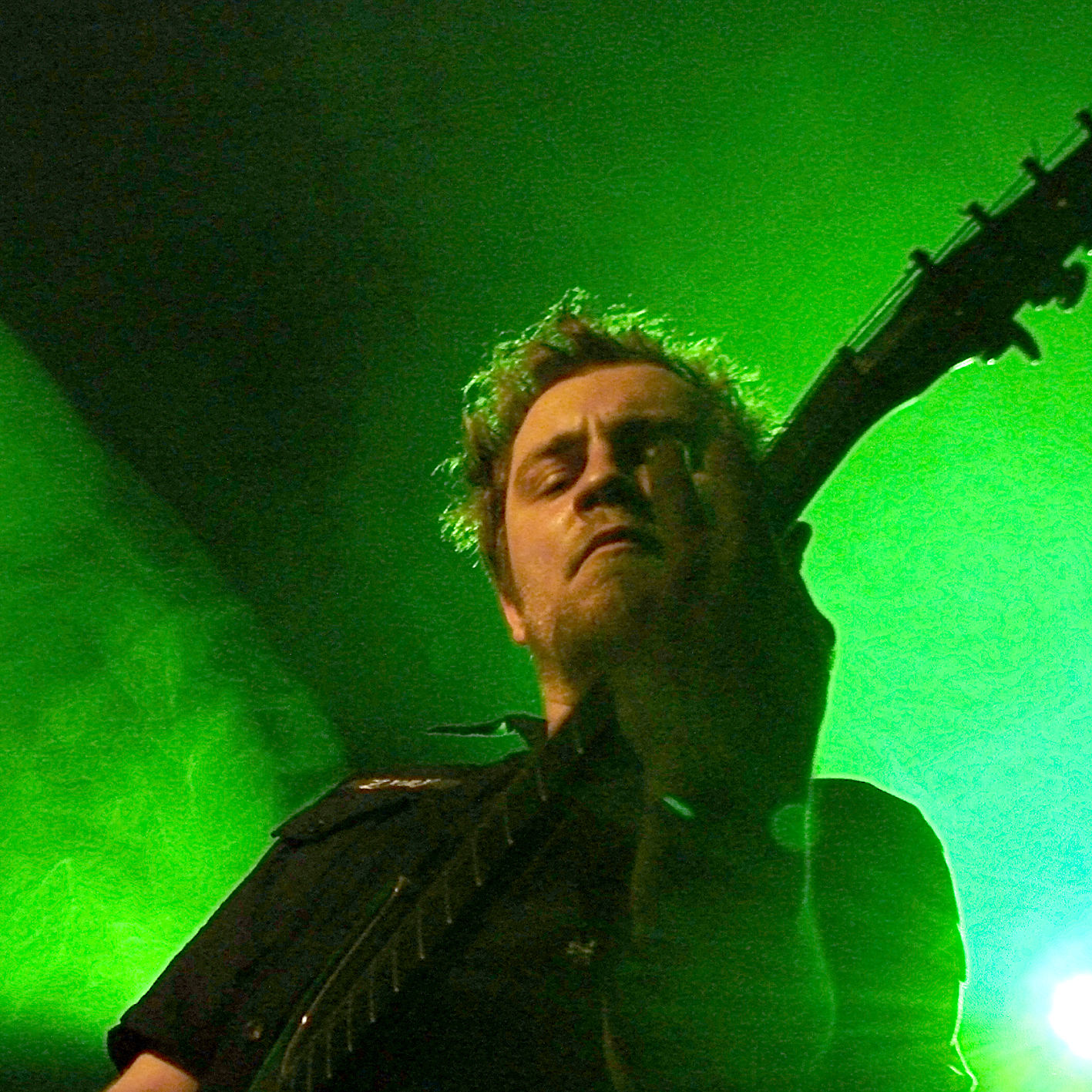 Benighted au Chaulnes Fest 08, le 22/03/08: Olivier à la guitare.